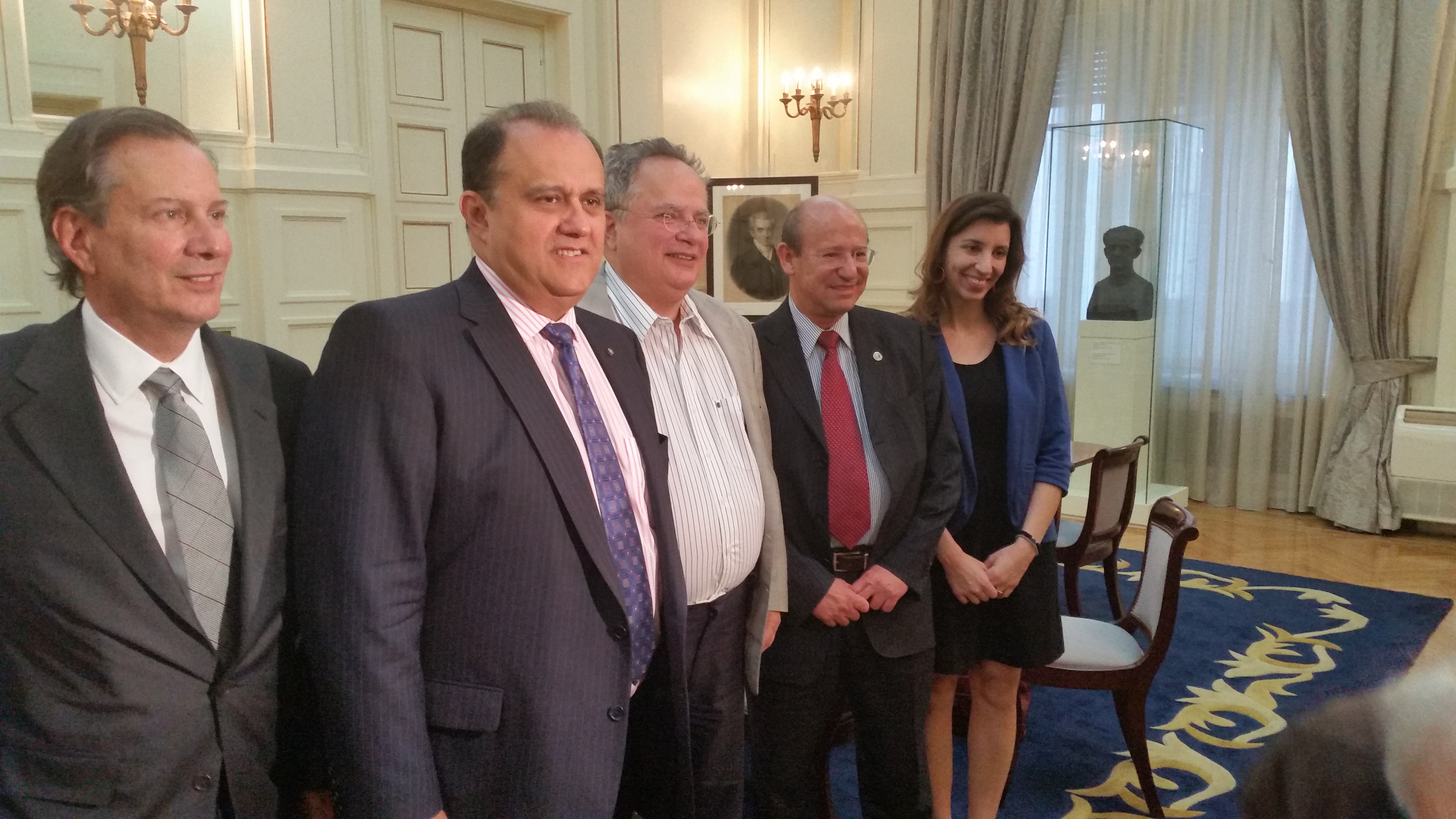 Ο Υπουργός Εξωτερικών, κ. Νίκος Κοτζιάς, συναντήθηκε την Δευτέρα 25 Μαΐου, στο Υπουργείο Εξωτερικών, με το Προεδρείο της Ελληνοαμερικανικής ομογενειακής οργάνωσης American Hellenic Institute.